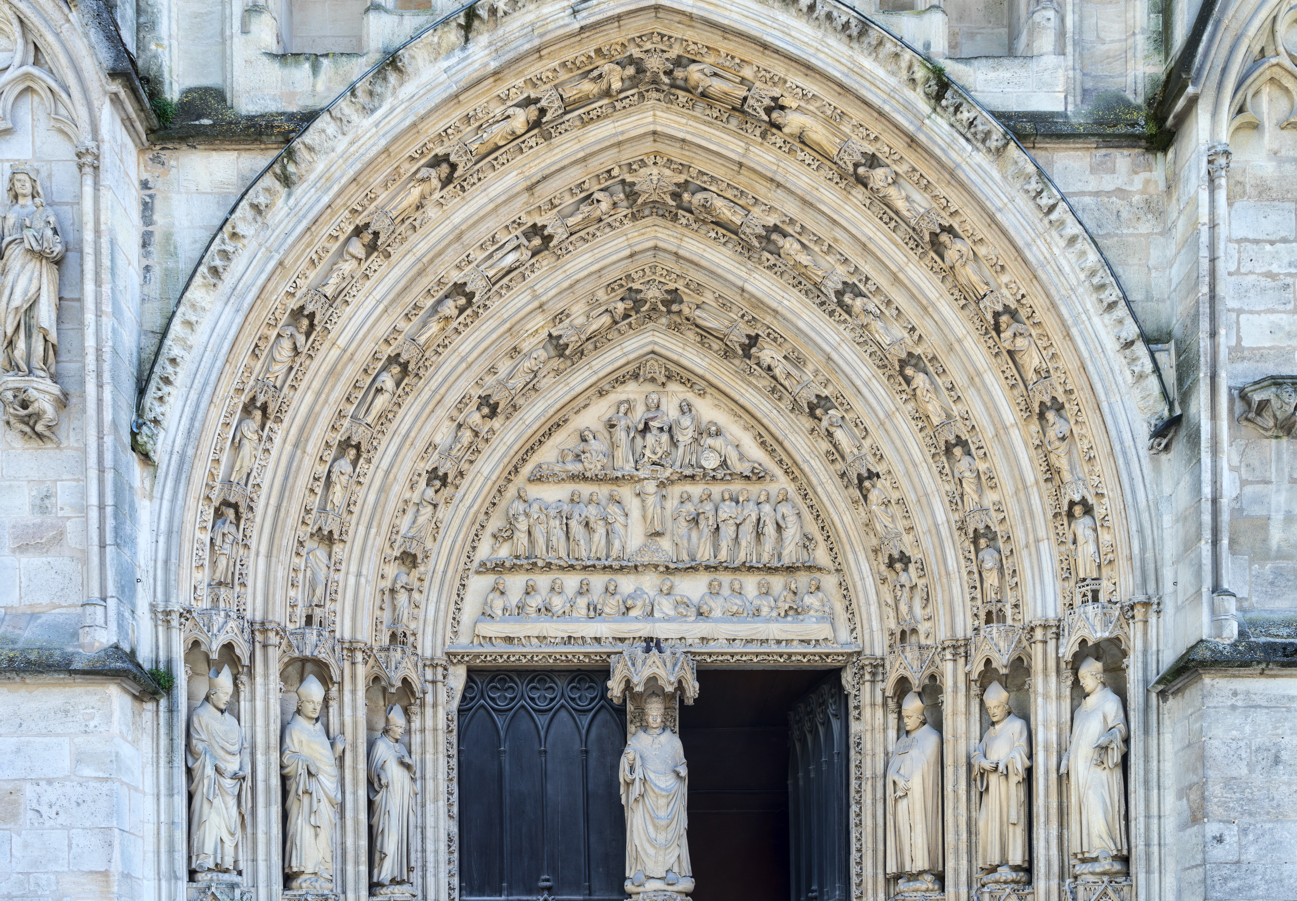 Bordeaux - Cathédrale St André - Portail des Flèches